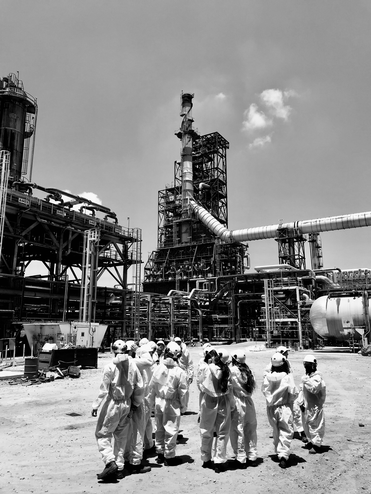 מהנדסים בסיור שטח ליד הפצחן המימני בבית הזיקוק לנפט חיפה מקבוצת בזן.